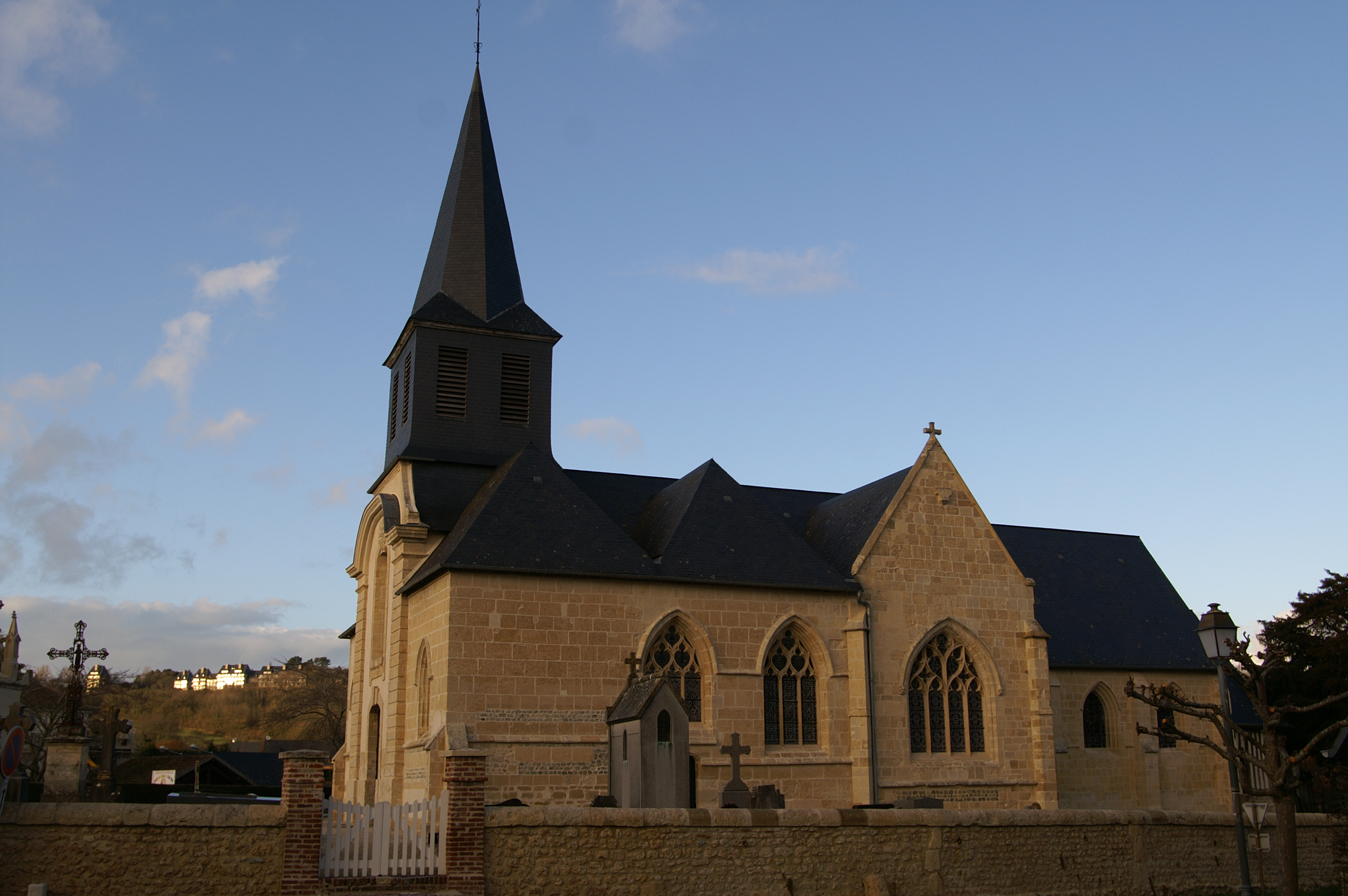 Église Saint-Pierre de Tourgéville.